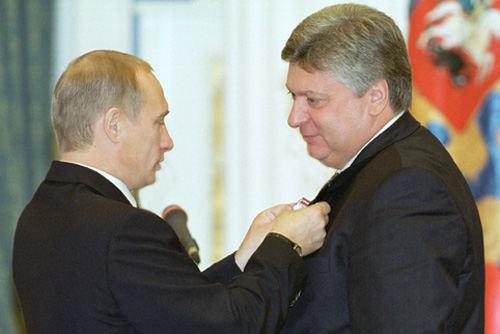 МОСКВА, КРЕМЛЬ. Церемония вручения государственных наград. Орден «За заслуги перед Отечеством» IV степени вручен ректору МГИМО Анатолию Торкунову.